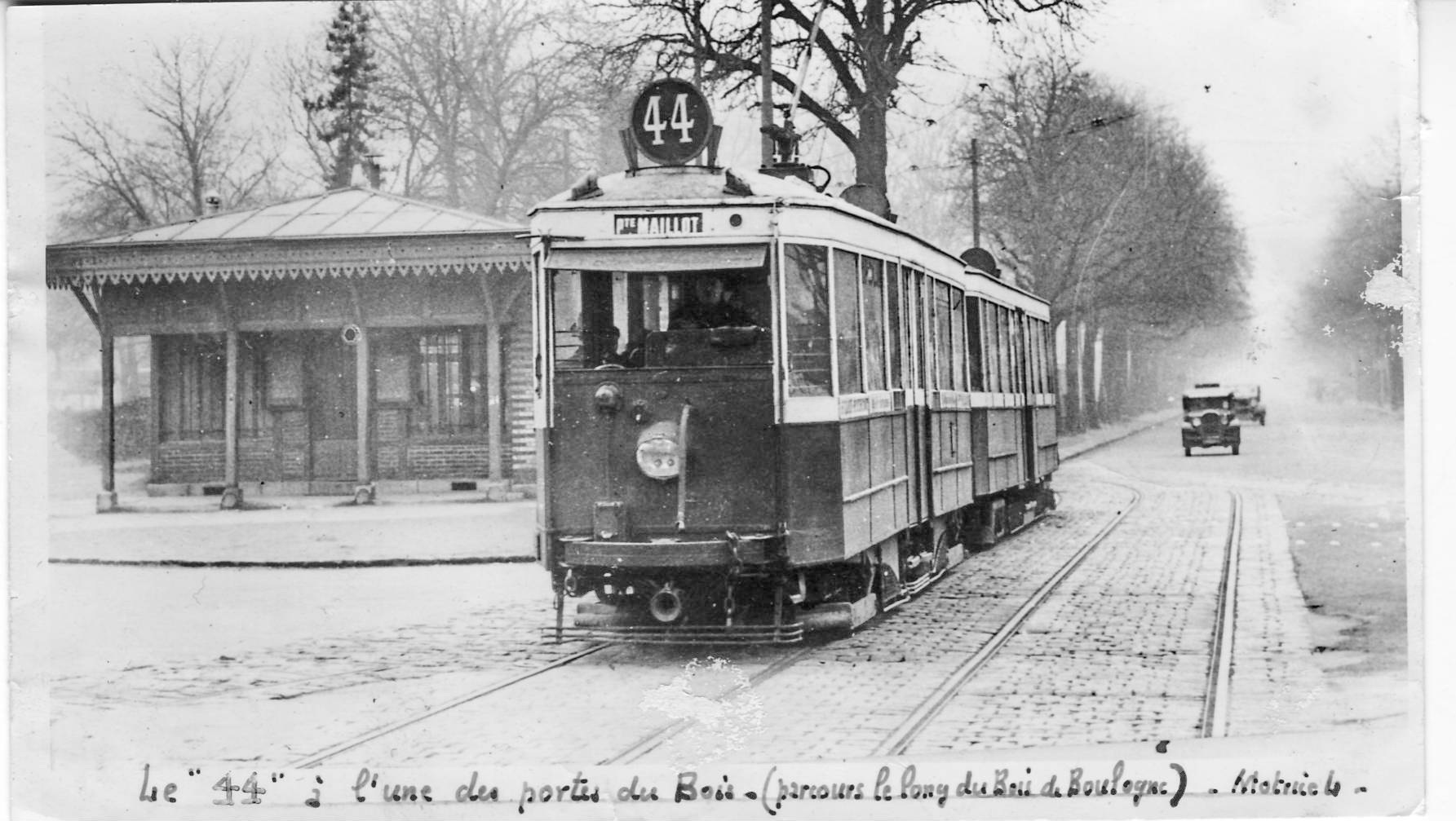 Photographie ancienne montrant une rame de la STCRP sur la ligne du tramway 44 (Saint-Cloud - Porte Maillot) à l'une des entrées du Bois de Boulogne.La rame est tractée par une motrice type L